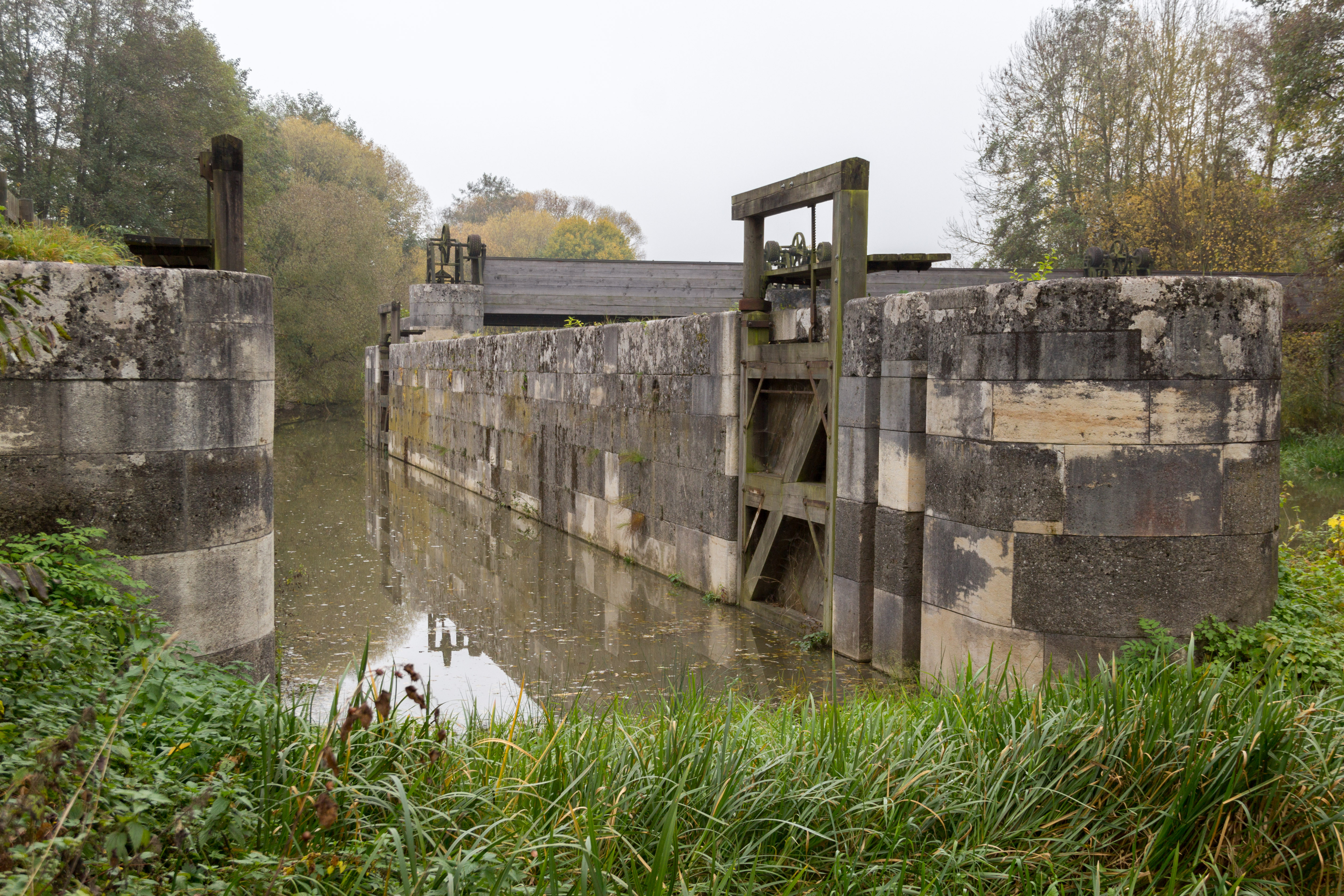 Ludwig-Donau-Main-Kanal, Schleuse 11, Schleuse, Riedenburg, Deising